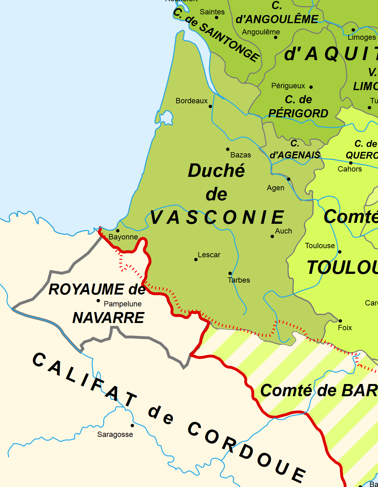 1911n marraztu duen William R. Shepherden mapan, Duché de Vasconieko lurraldea ikus dezake.